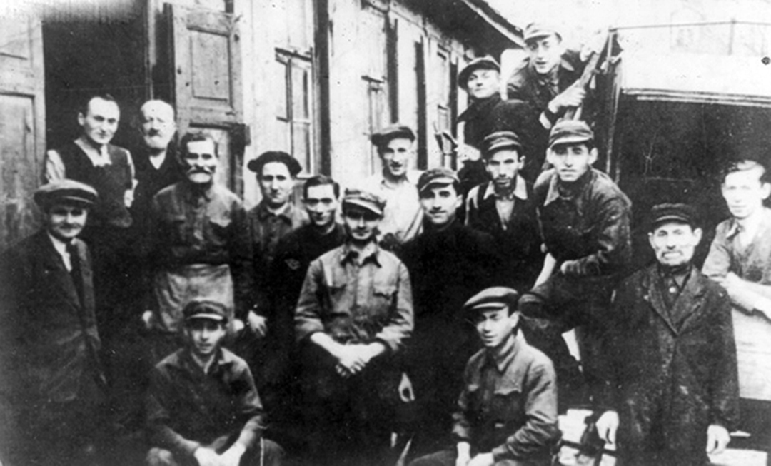 Benedykt Kraskowski (z lewej) z grupą Żydów z getta: Mojsze Lichtenbojm (drugi z lewej), Dzili Kajdenbaum (stojący, czwarty z lewej), Jankel Brodacz (stojący, szósty z lewej), Icchak Kaner (stojący, siódmy z lewej), Josef Edelsztajn (stojący w długim rzędzie, dziewiąty siódmy z lewej), Szimszon Esztman (stojący w długim rzędzie, drugi z prawej), Mojsze Kajdenbaum (stojący w długim rzędzie, z prawej), (para młodych ludzi w prawym górnym rogu) Zilia Gutenberg (z lewej )i Hirsz Szulman (z prawej), Cuker (z prawej), Aszer Kajdenbaum (drugi z prawej), i Jehoszua Kajdenbaum (na dole po lewej).